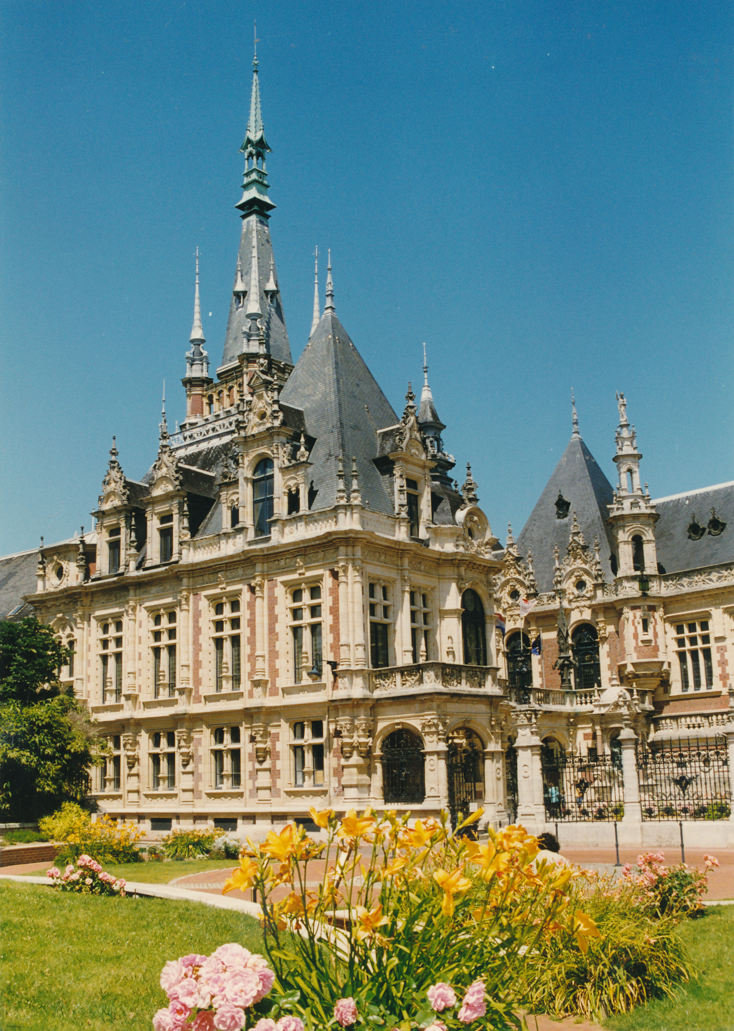 Kloster Benedictine Datum: 07/1998 Urheber: Michael Pfeiffer Quelle: privates Fotoalbum des Urhebers